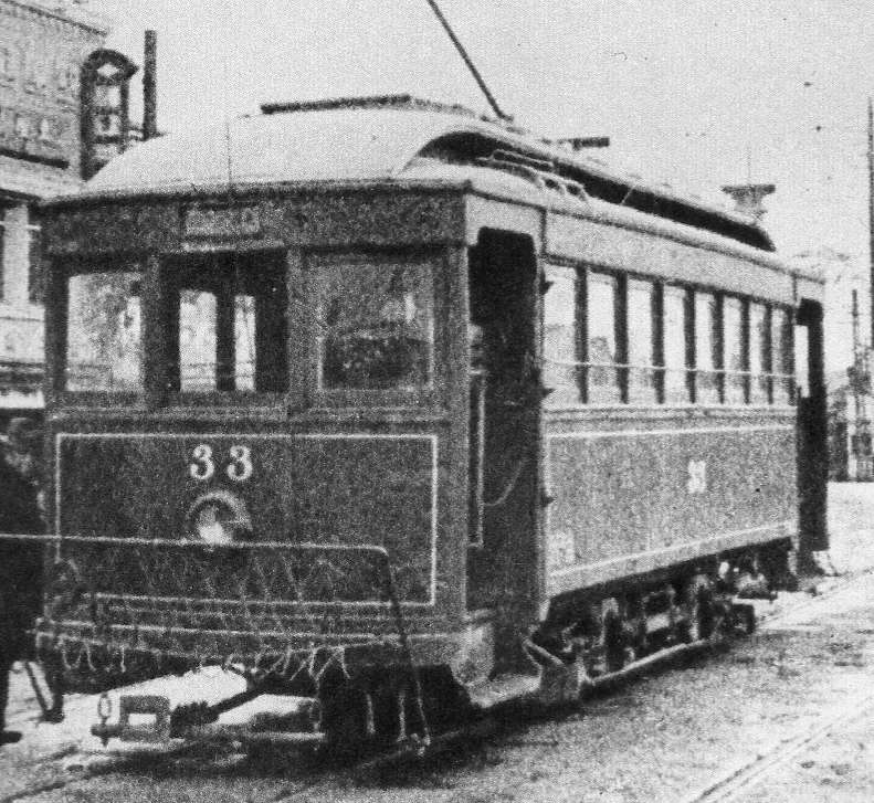 美濃電33号。1941年の改番で19号、1949年の改番でモ10形10に。